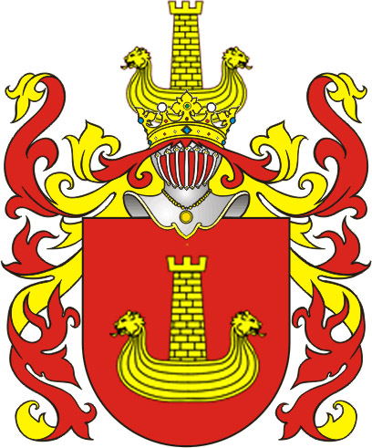 Korab Clan